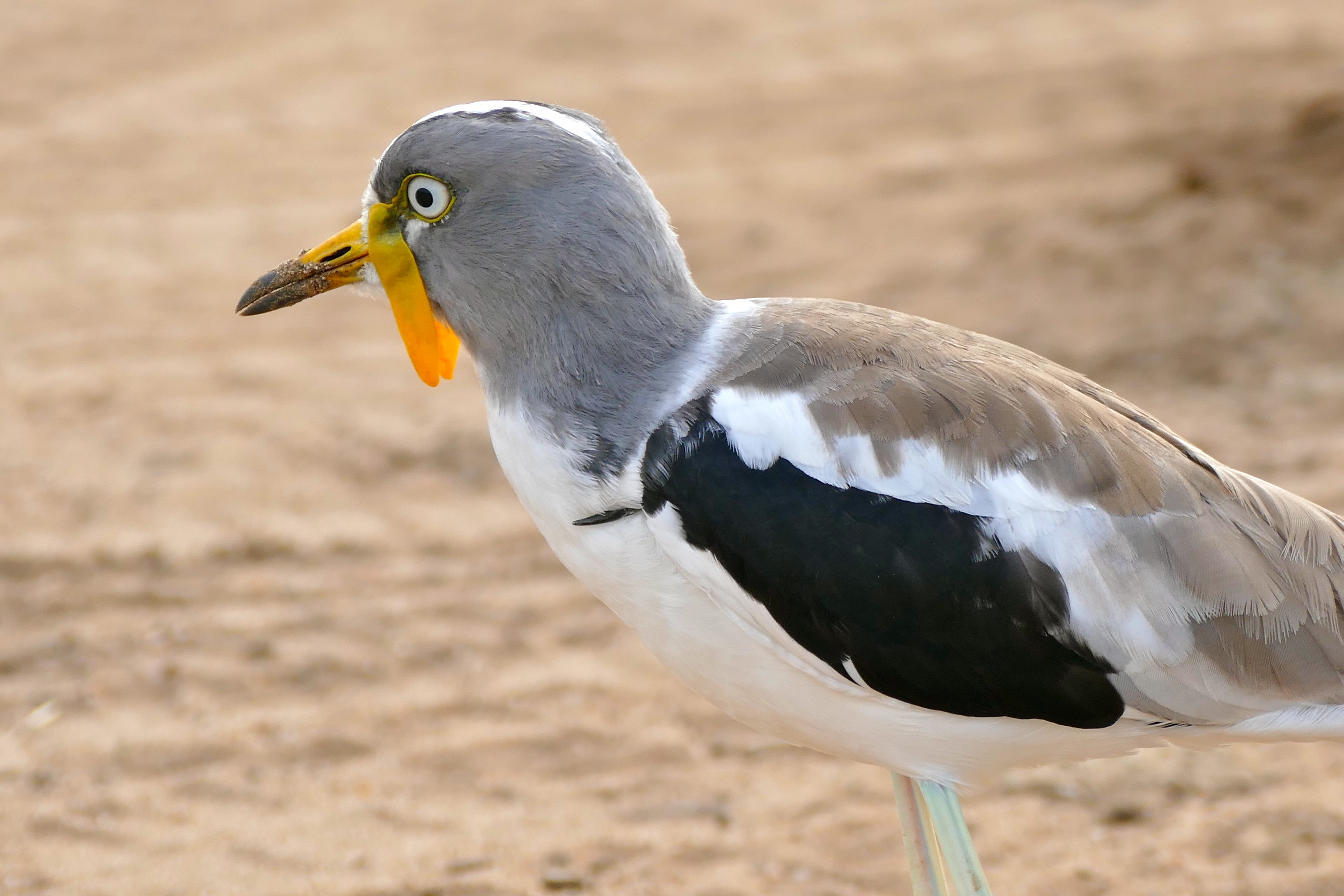 Sunset Dam, Lower Sabie, Kruger NP, SOUTH AFRICA